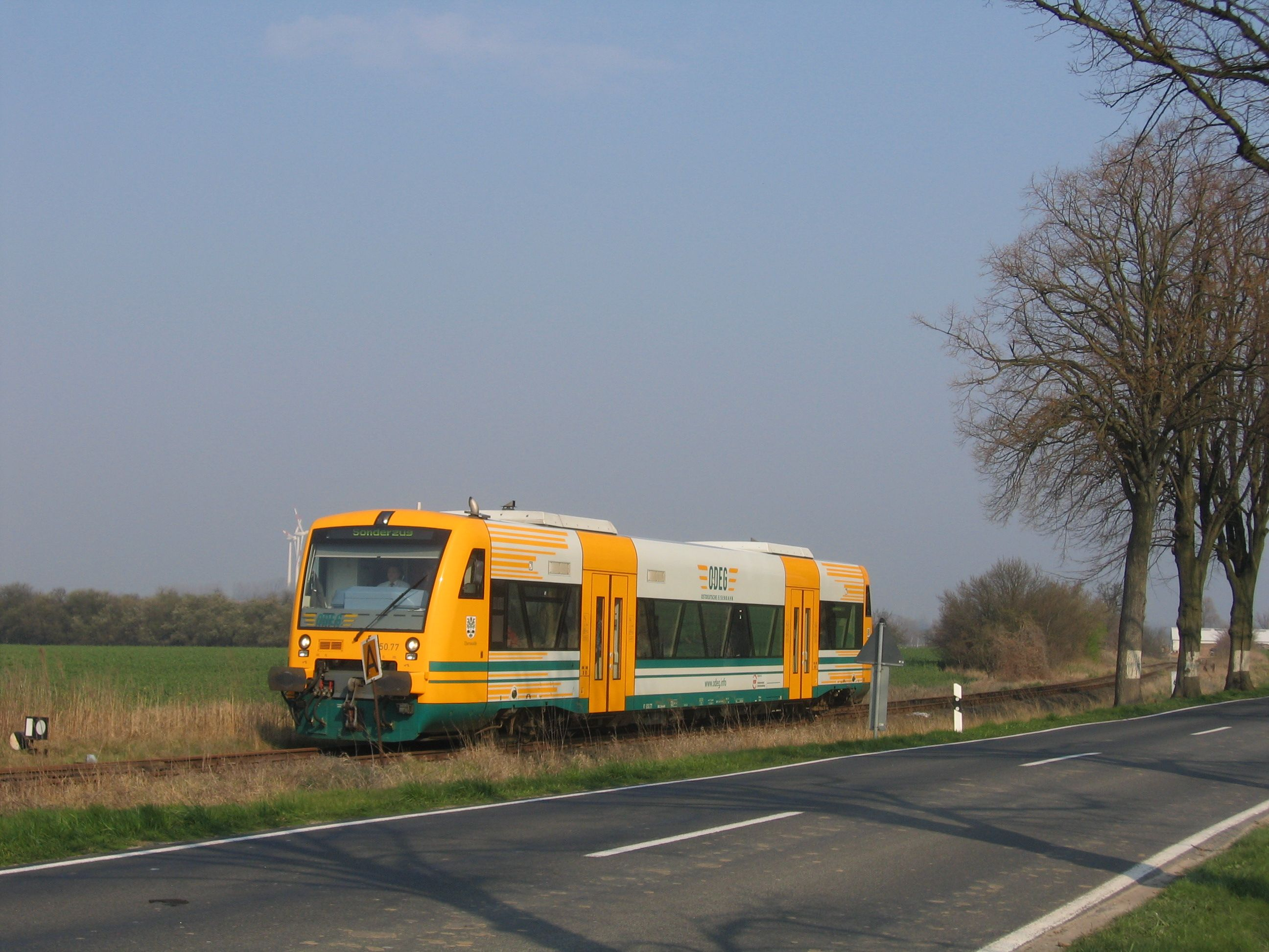 ODEG_Regio-Shuttle